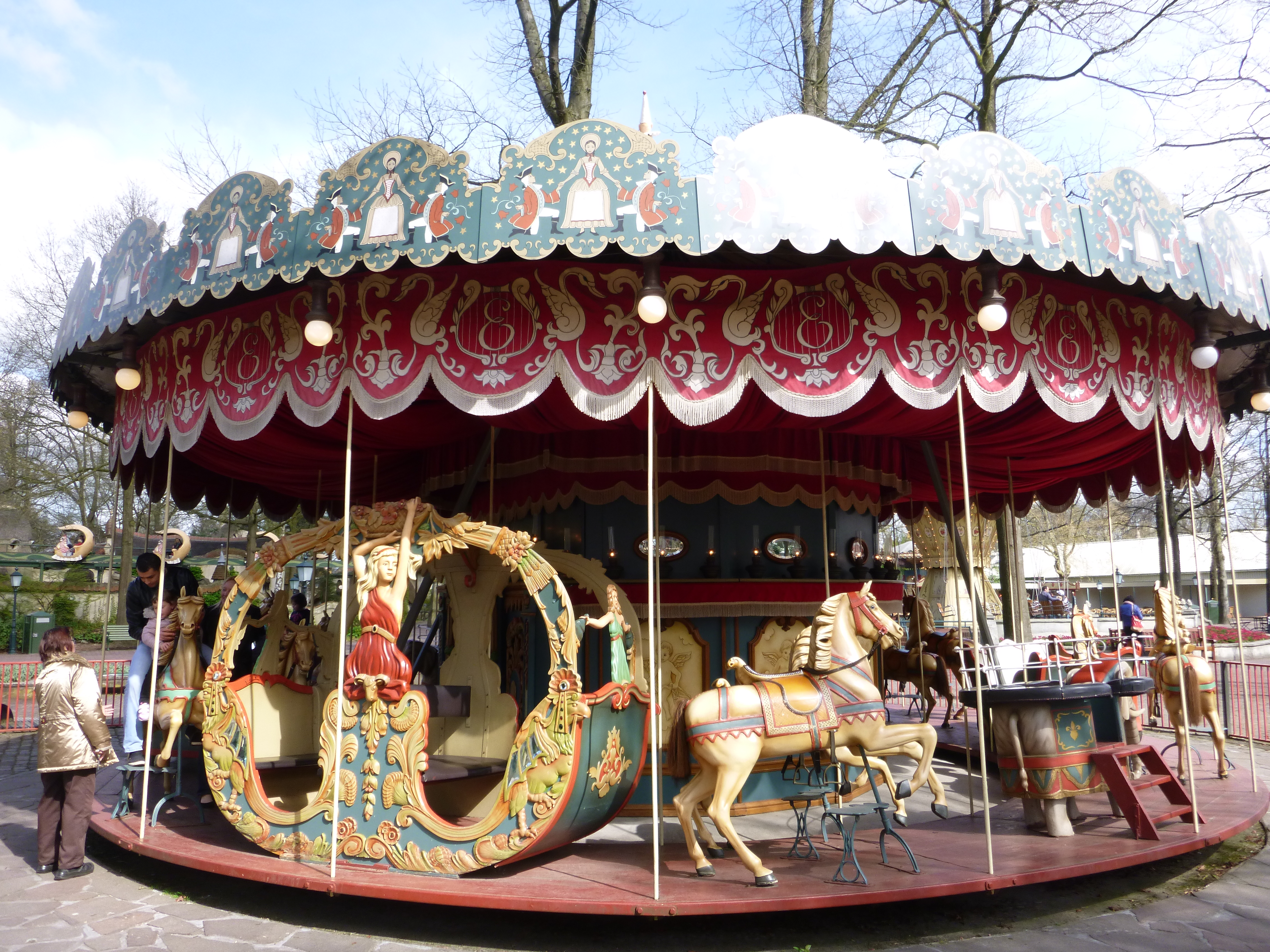 Carrousel Anton Pieck Efteling